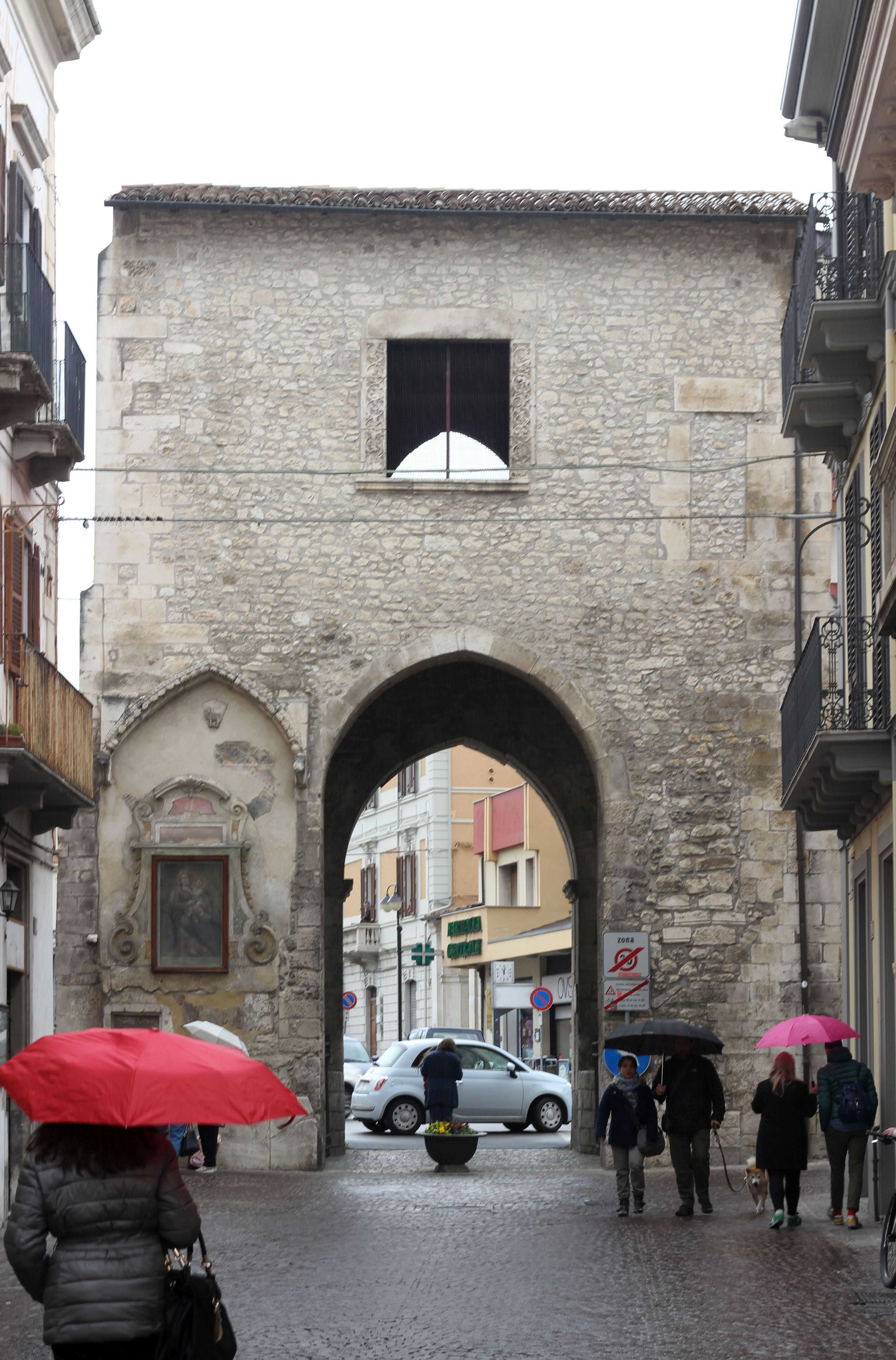 Porta Napoli in Sulmona von Norden